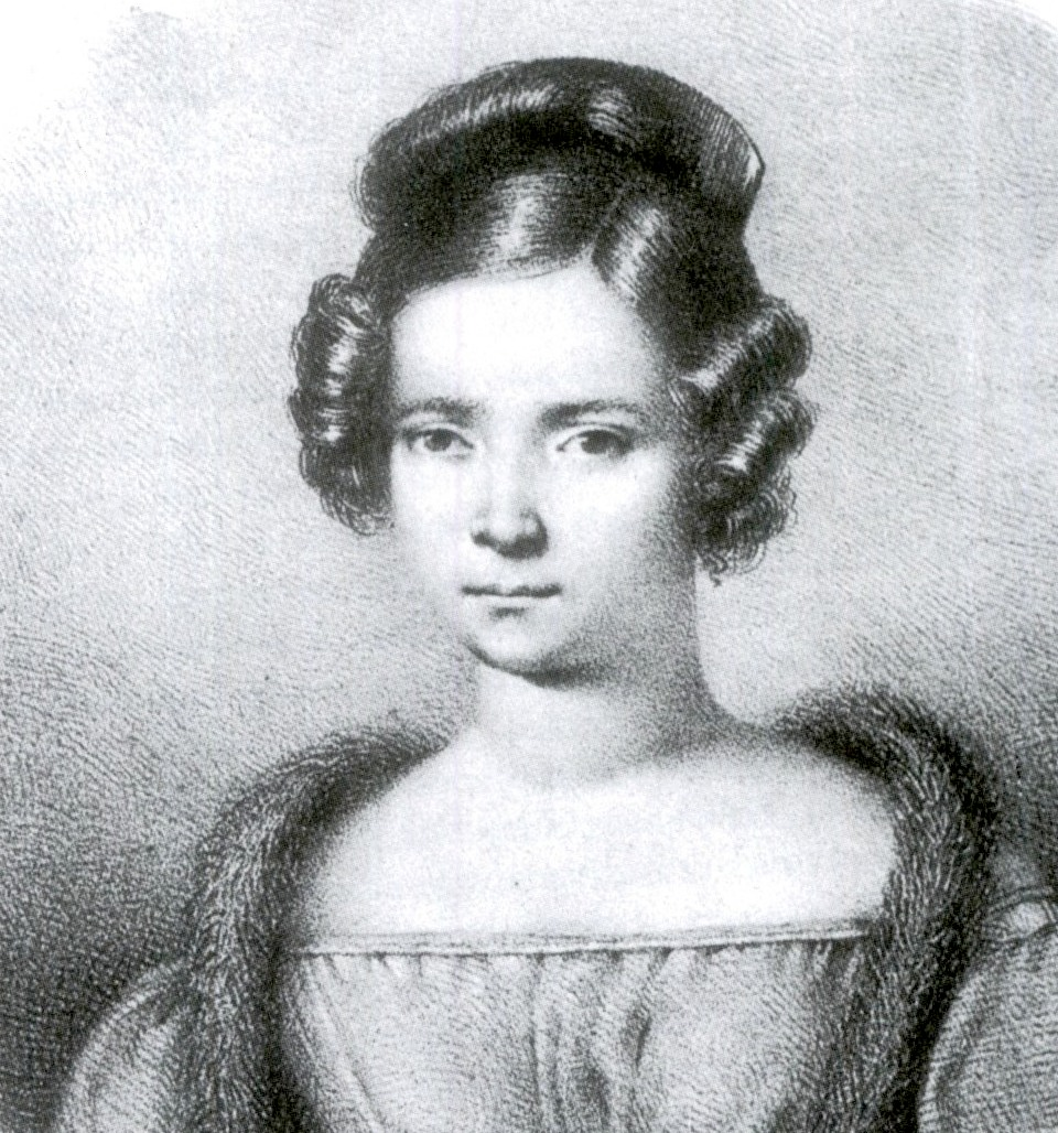 Luigia Boccabadati-Gazzuoli, first Antonia in Gaetano Donizettis's «La romanzesca e l'uomo nero»